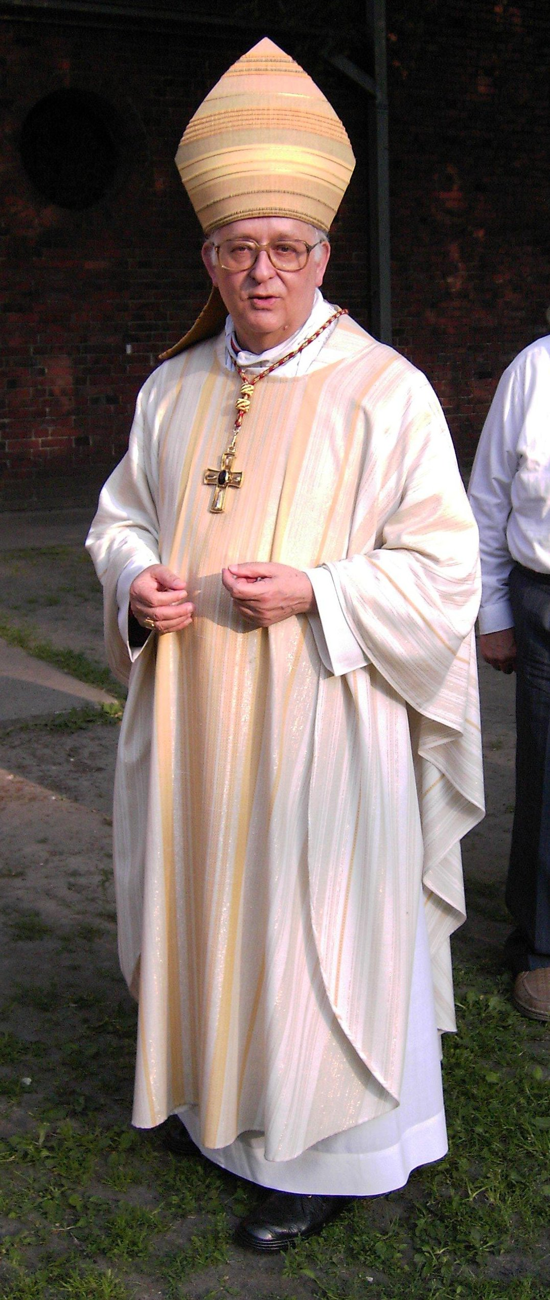 Kardinal Georg Sterzinsky, Erzbischof von Berlin.